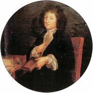 Médecin du roi Louis XIV